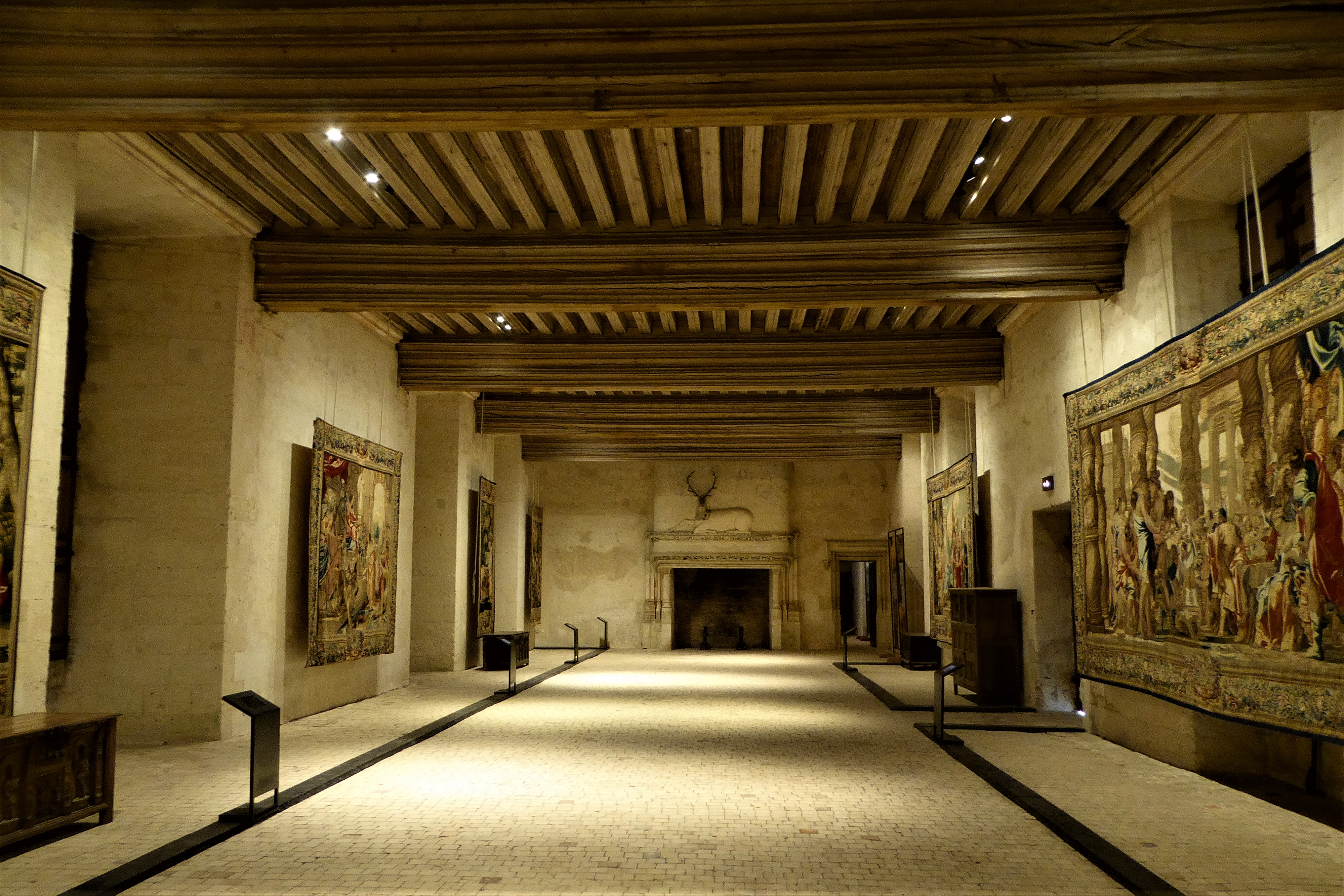 Rez-de-chaussée de l'aile Longueville, château de Châteaudun, Eure-et-Loir, France.